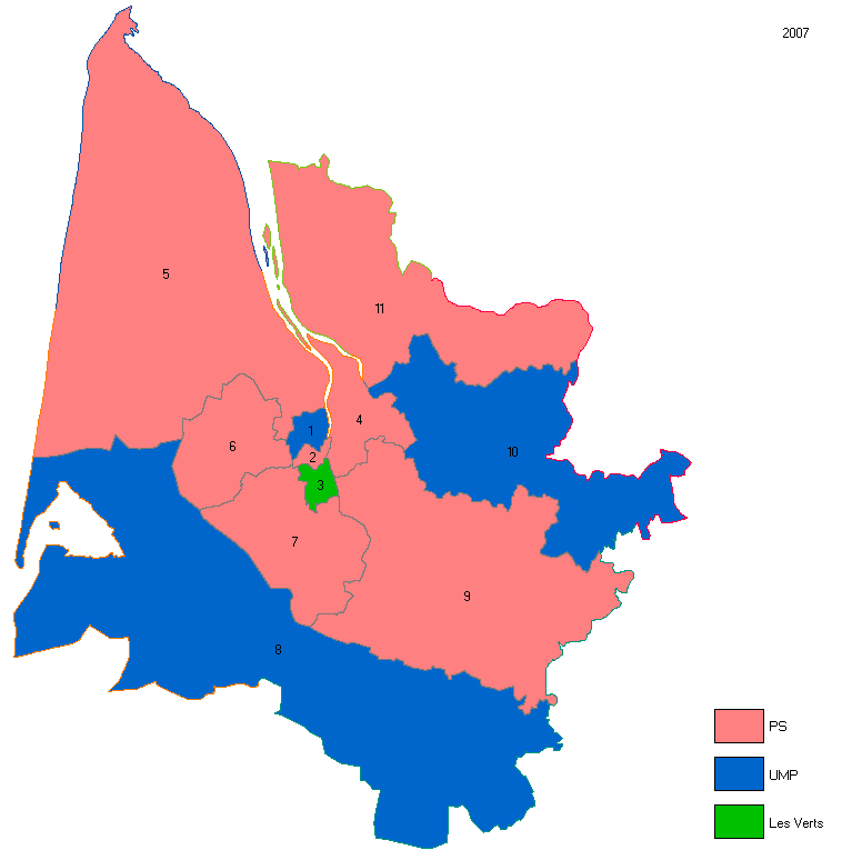 Couleur politique des circonscriptions de la Gironde en 2007.